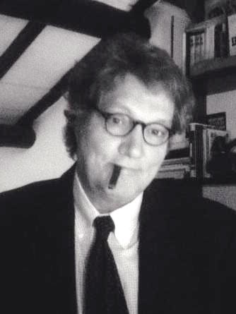 Maurizio Testa. giornalista e scrittore italiano